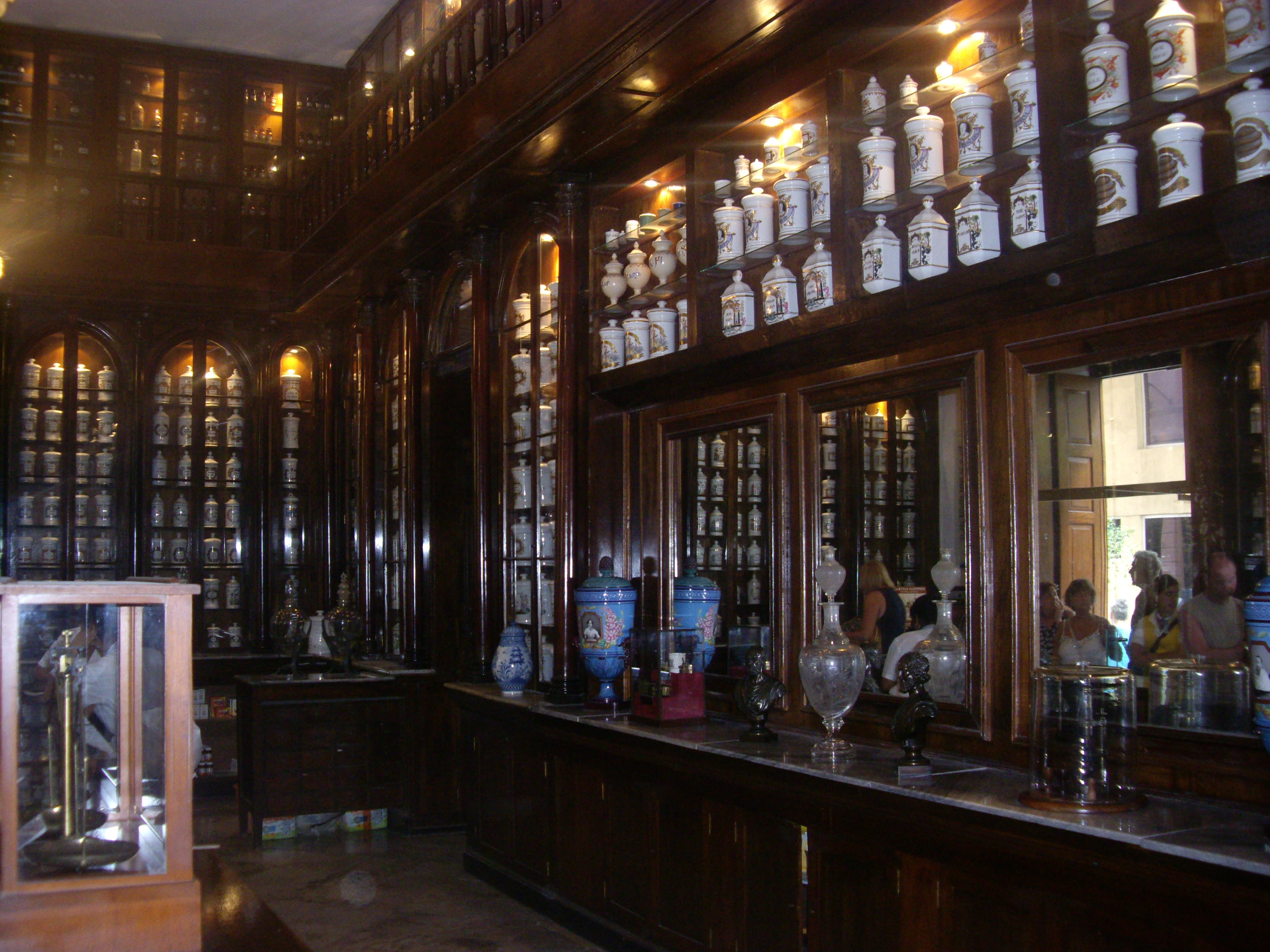 Farmàcia Taquechel. L'Havana, Cuba